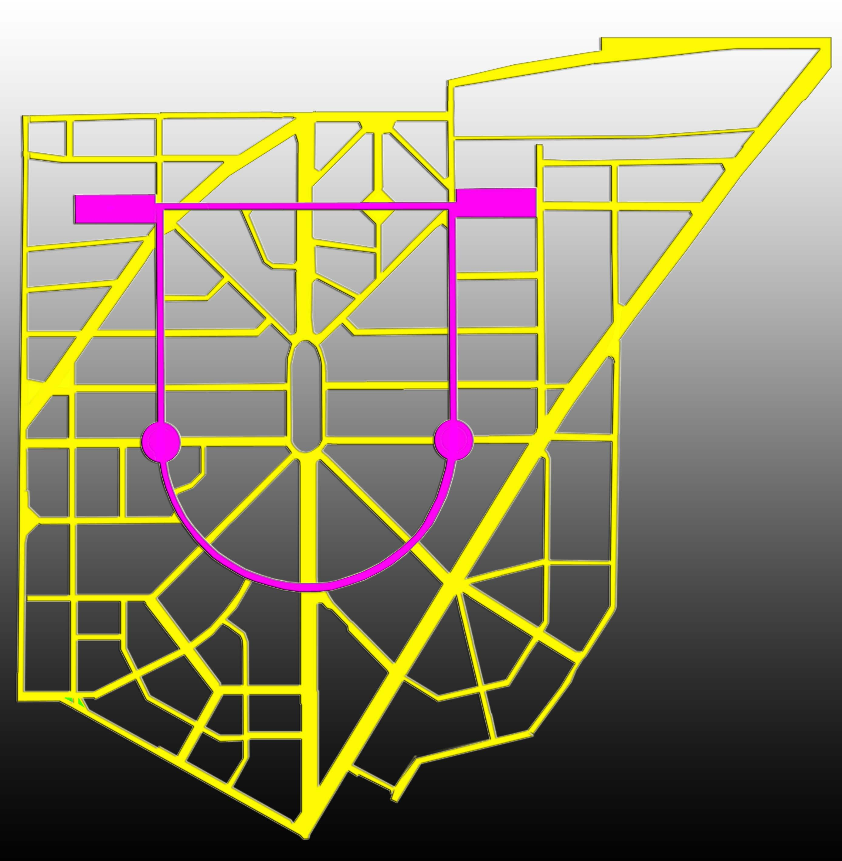 Friedenauer Carstenn Figur mit Verlauf